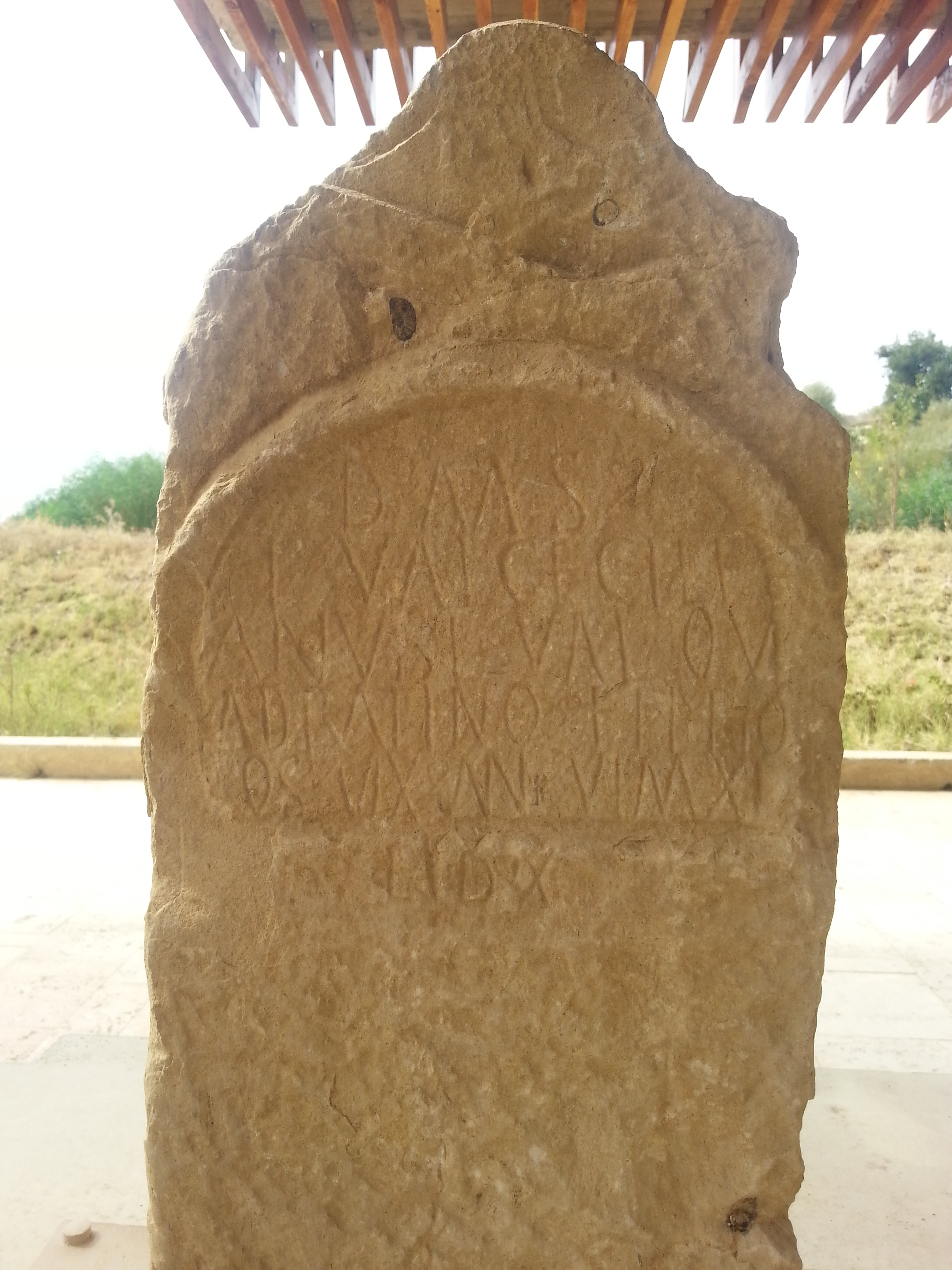 Estela con un frontón triangular de un niño. Dedicatoria de Lucius Valeriius Caecilianus para su hijo Valerius Quadratinus que vivió 6 años, diez meses y diez días. Encontrada en el suburbio oeste de Volubilis. Calcárea.